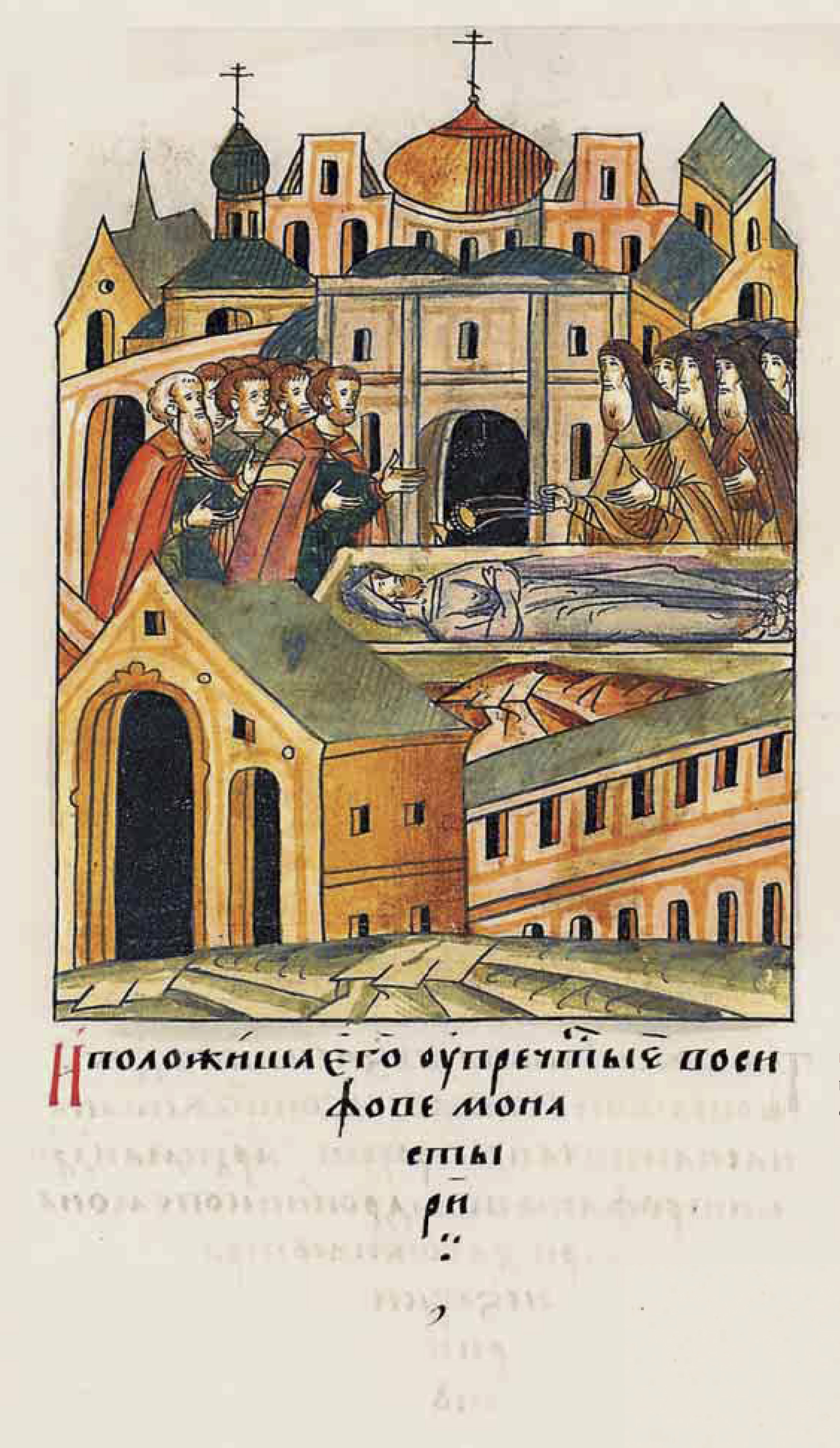 и положили его в церк- ви Пречистой в Иоси- фове монастыре.